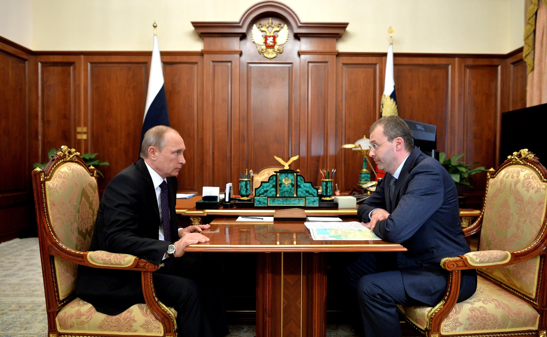 Рабочая встреча Владимира Путина с губернатором Чукотского автономного округа Романом Копиным